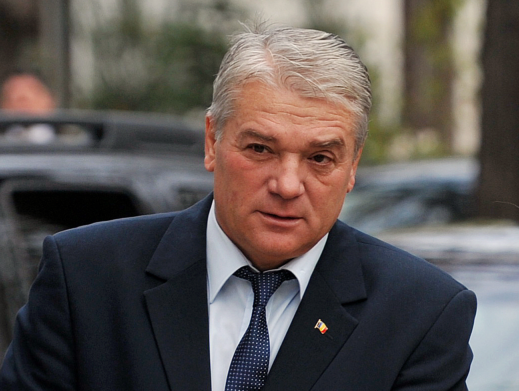 Rovana Plumb si Nicolae Moga la reuniunea BPN - 02.12.2013